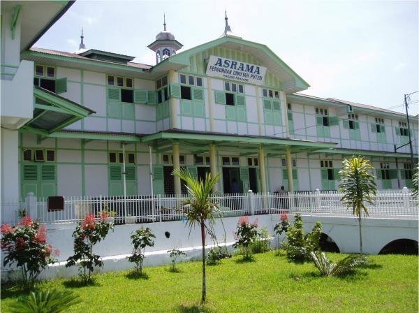 Asrama Diniyah Putri